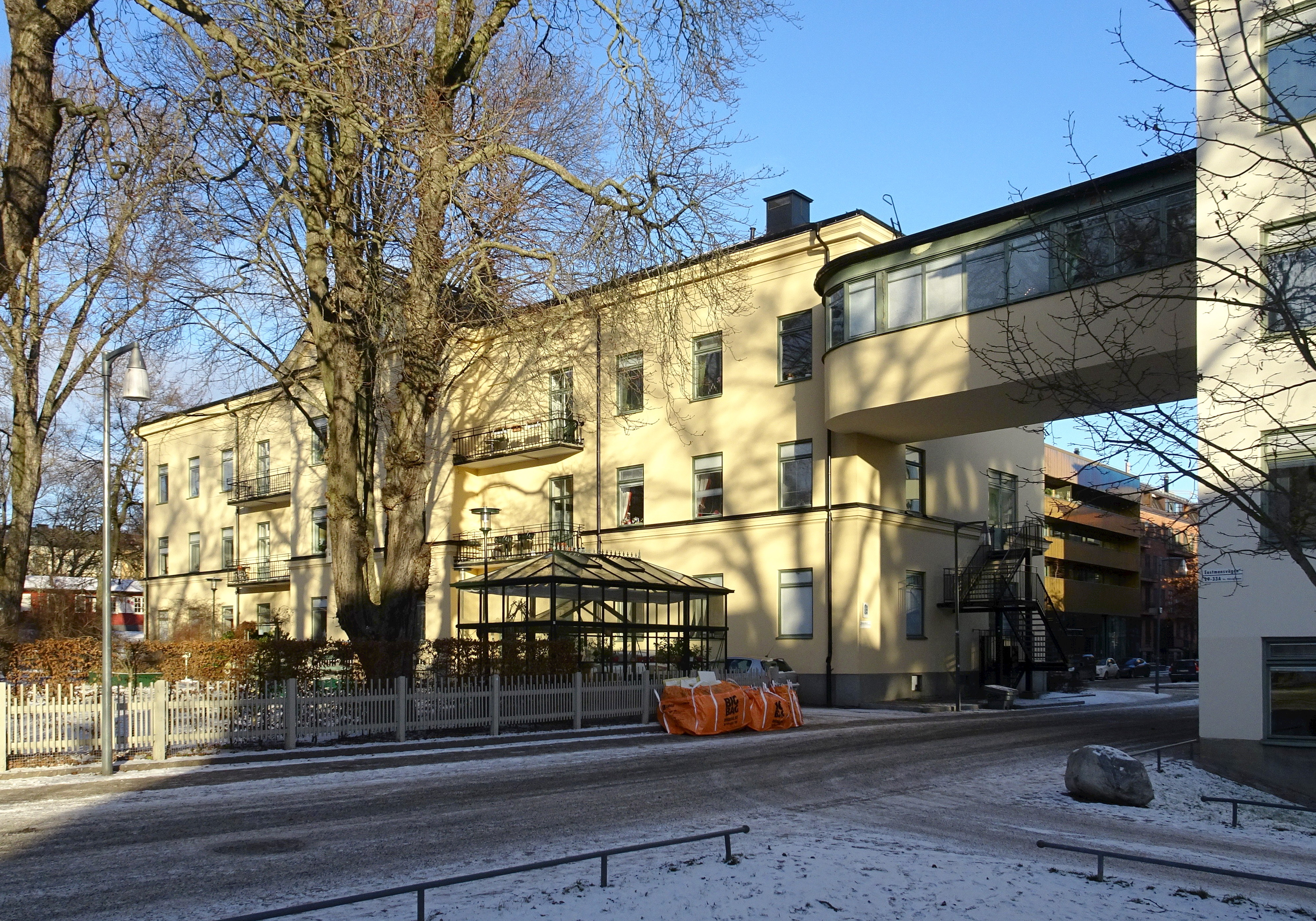 Johanneshuset, Sabbatsberg, Nybyggnadsår 1870 - 1872, nFattigvårdsnämnden (Byggherre) Per Ulrik Stenhammar (Arkitekt) Johanneshuset uppfördes ursprungligen som fattighus för fattighjonen Johannes församling